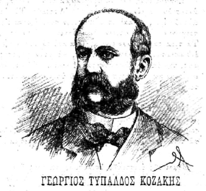 griechischer Politiker, 19. Jahrhundert